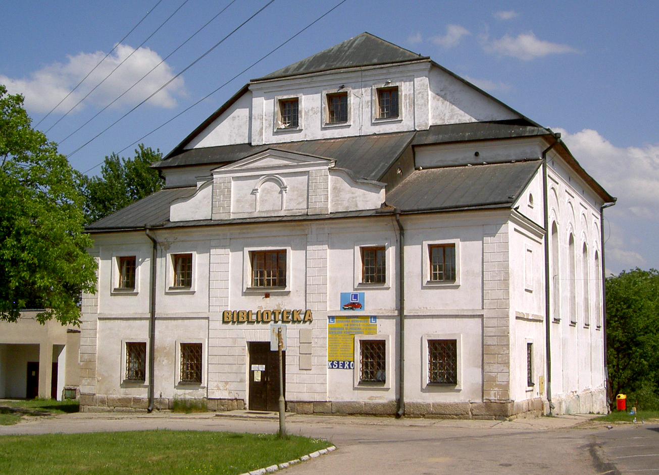 Tarnogród, Poland - Synagogue (now library) • Tarnogród, Polska - Synagoga (obecnie biblioteka)